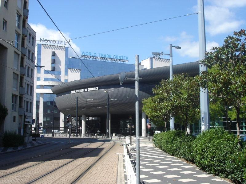 L'école supérieure de commerce, rue Pierre Sémard à Grenoble.